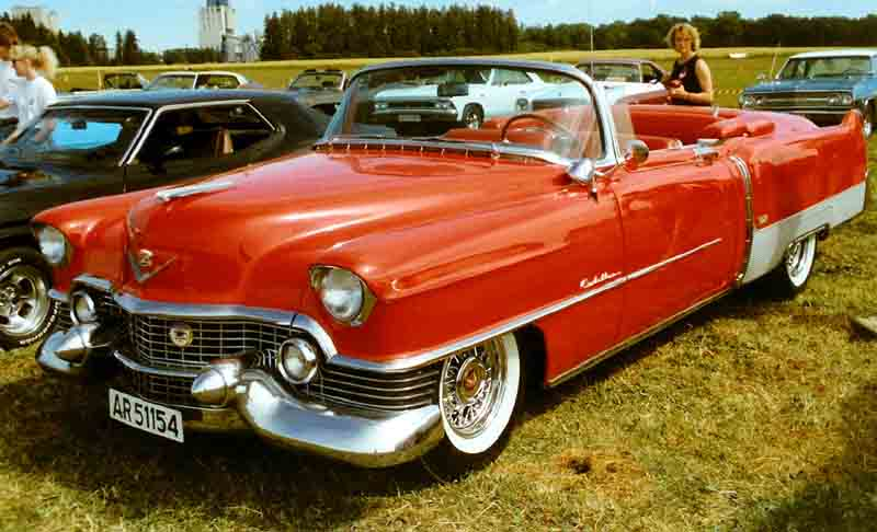 1954 Cadillac Eldorado Convertible